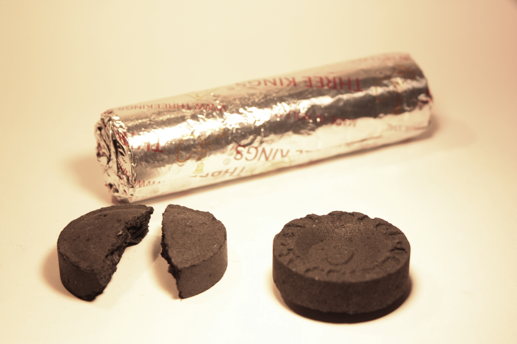 Węgielki do trybularza.